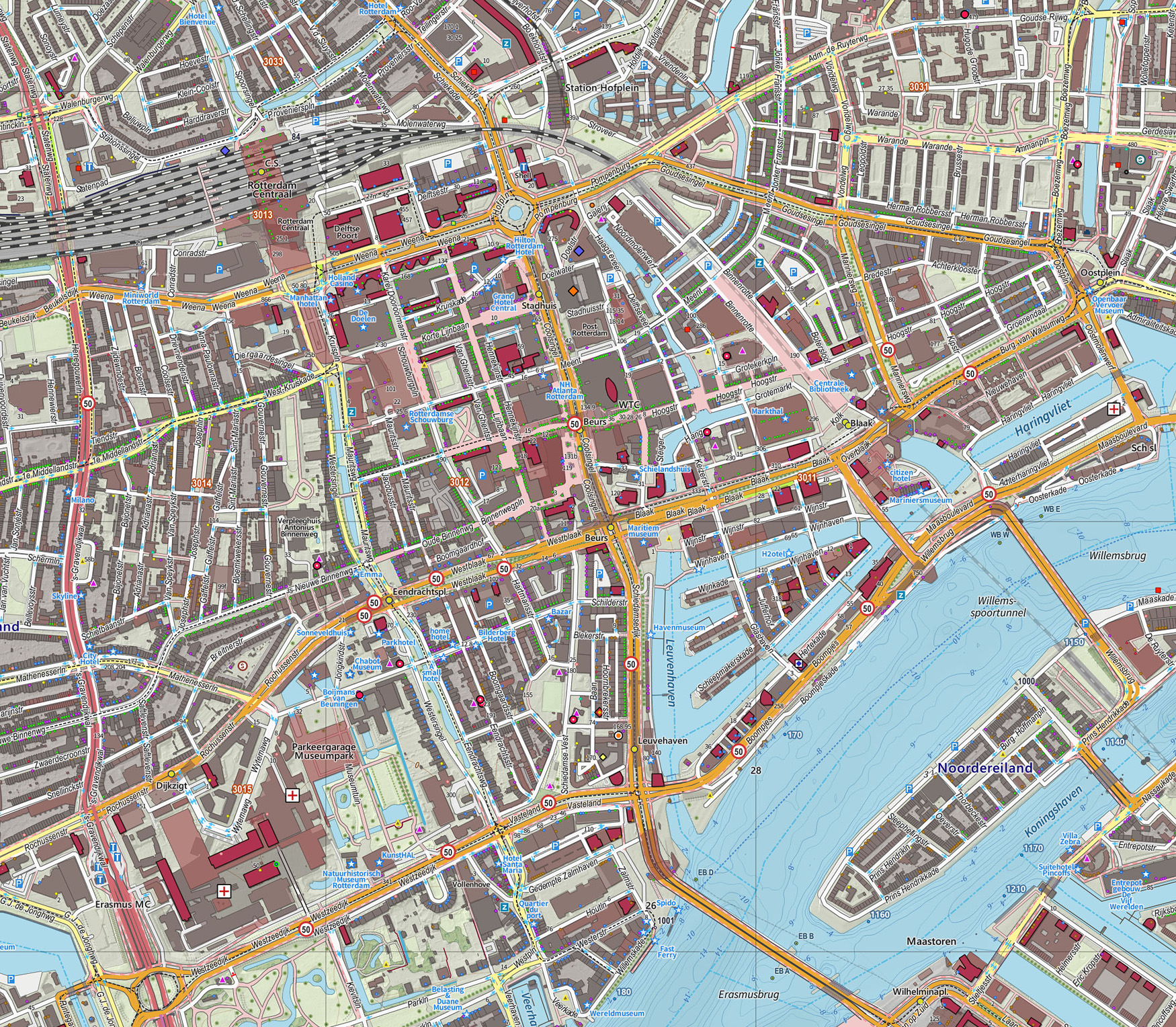 Topografische kaart van Rotterdam (centrum van woonplaats). Resolutie: 640 pixels/km. Kaartbeeld samengesteld uit de open geodata van de Top10NL en Top25namen (Basisregistratie Topografie, Kadaster), Creative Commons BY licentie. Gebouwvlakken uit open geodata BAG extract. Wegen uit de OpenStreetMap. Reliëfschaduw uit de Actuele Hoogtekaart AHN2. Samenstelling en kleurenschema: Jan-Willem van Aalst, met QGIS2. Zie ook de Legenda.